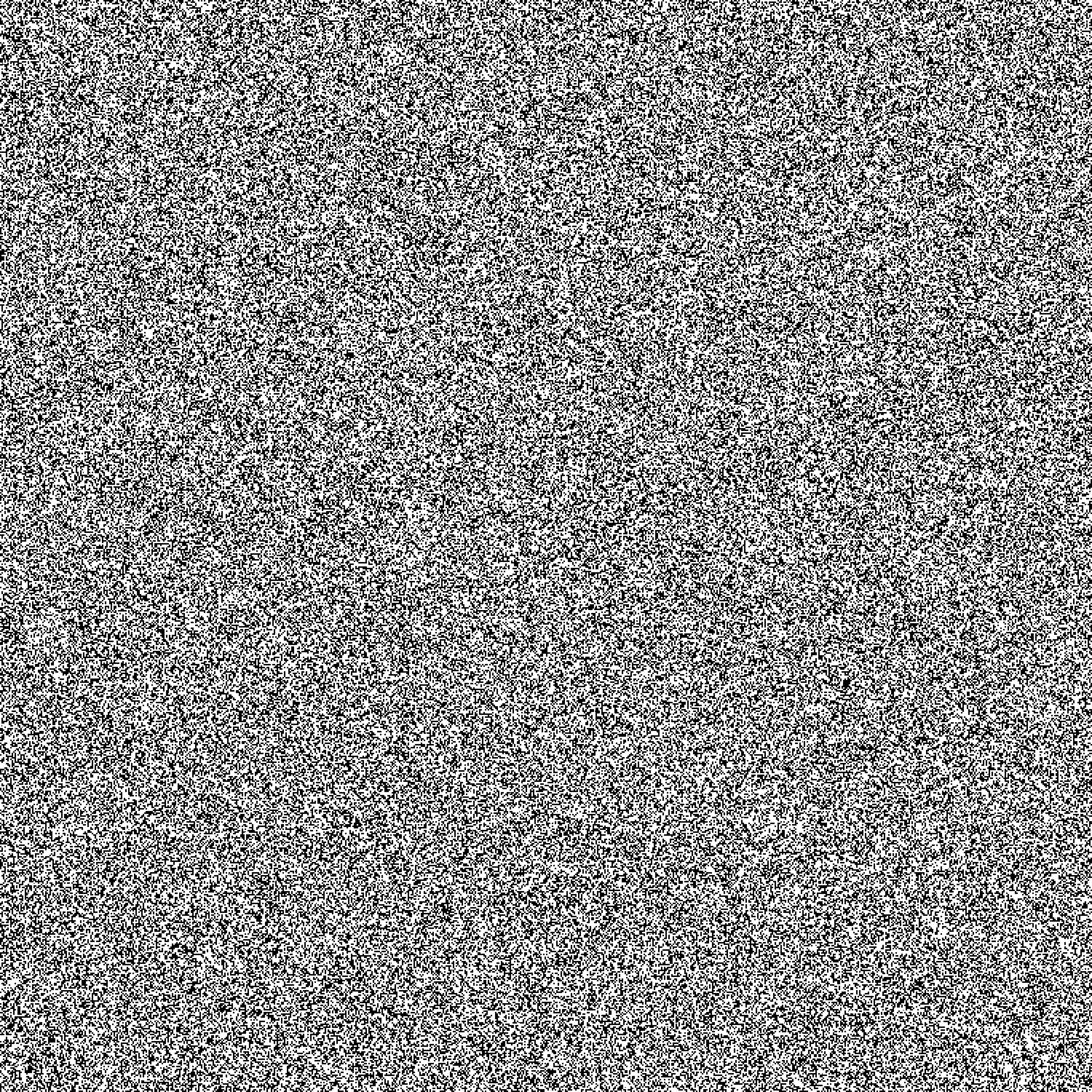 テレビ映像の残像現象のパターン。目を細めると文字が見えてくる。自作、未完成。